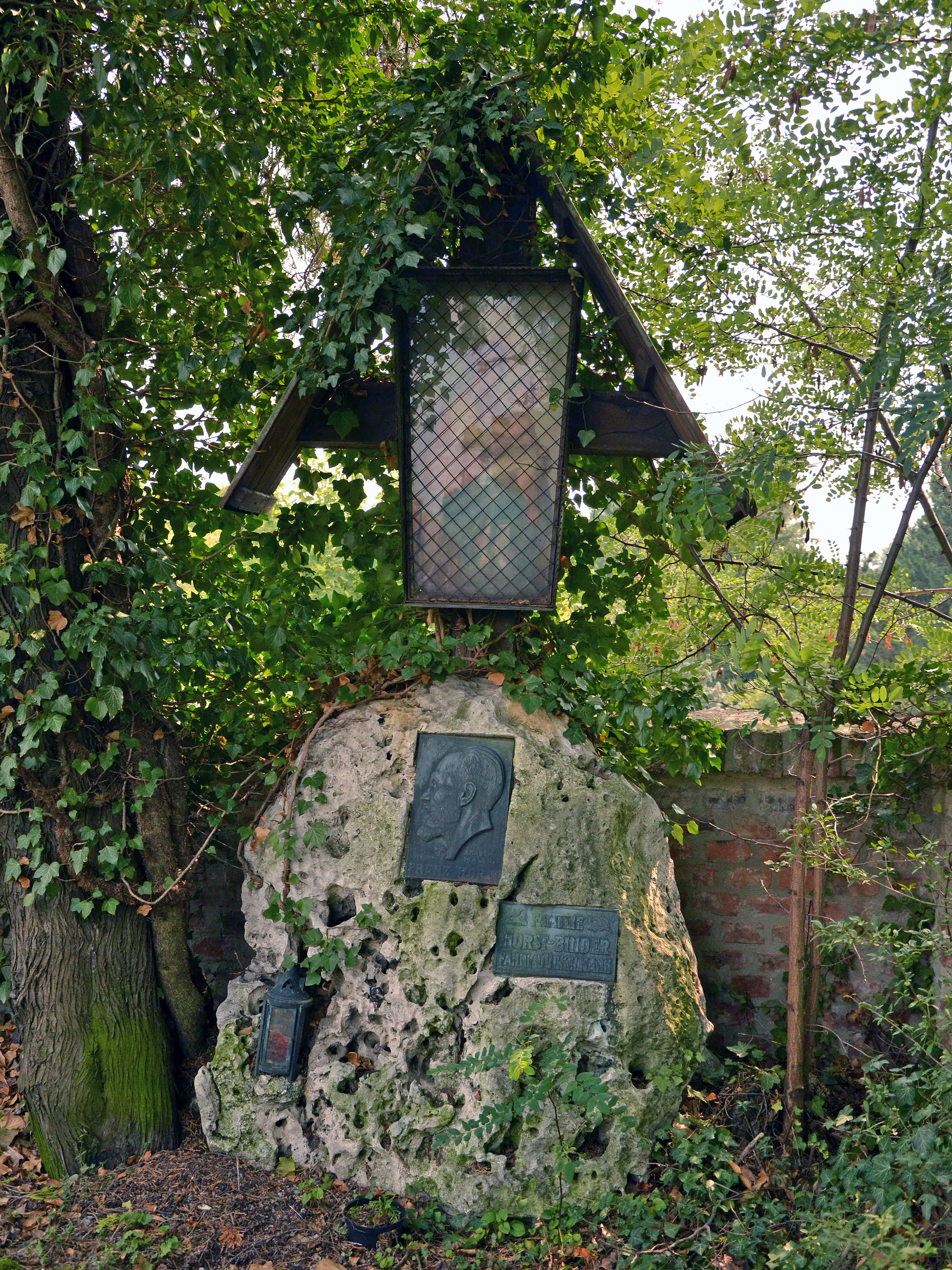 Franz Horst war ein österreichischer Porträt-, Landschafts- und Militärmaler.